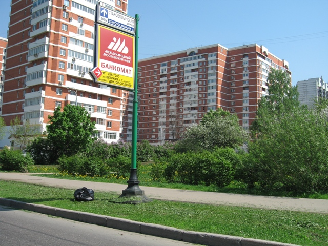 Очаково-Матвеевское, ул. Веерная д. 9 и 30